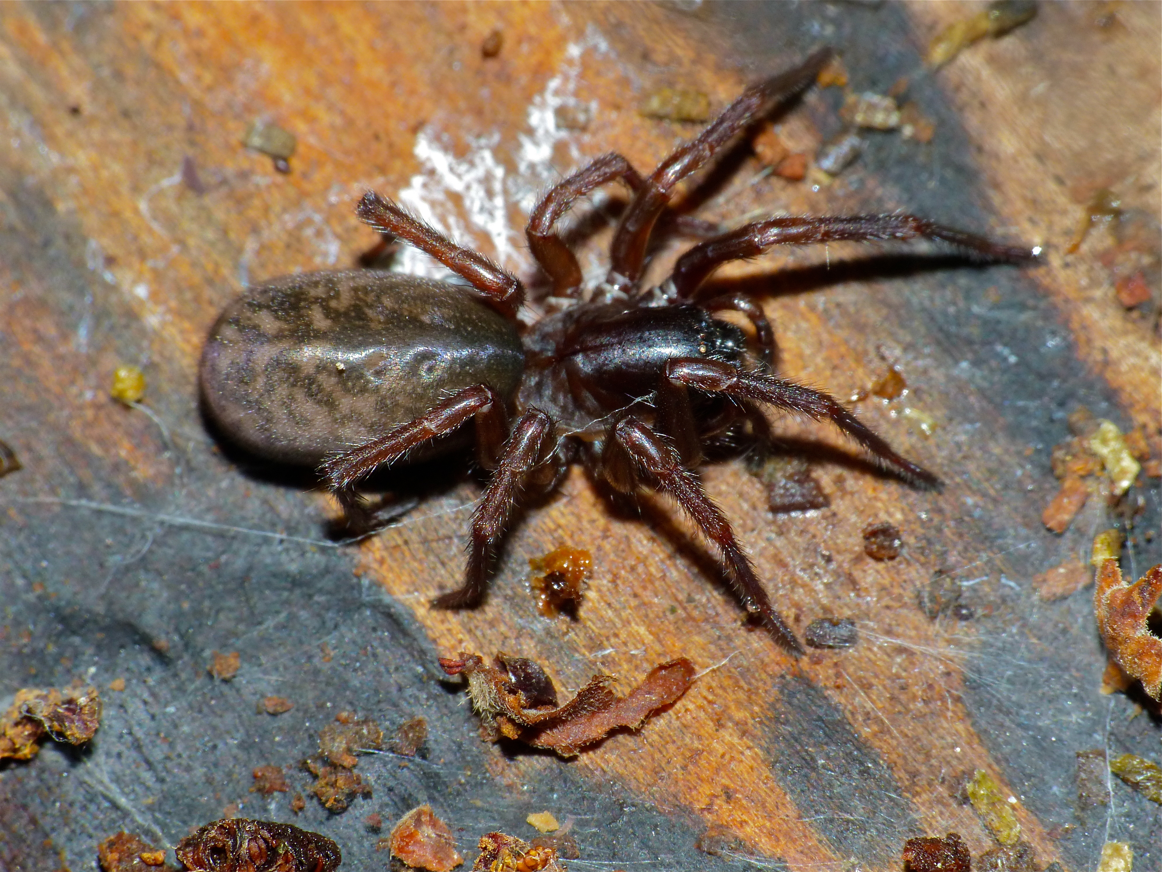 Forêt d' Ecouves, Orne, FRANCE